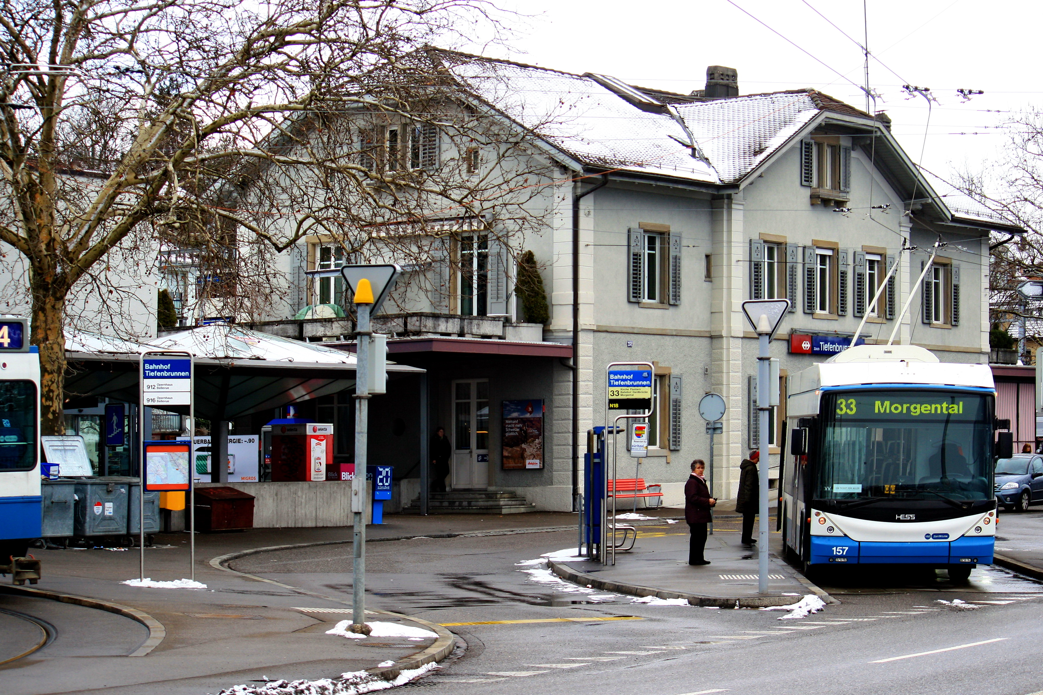 Zürich-Tiefenbrunnen train station